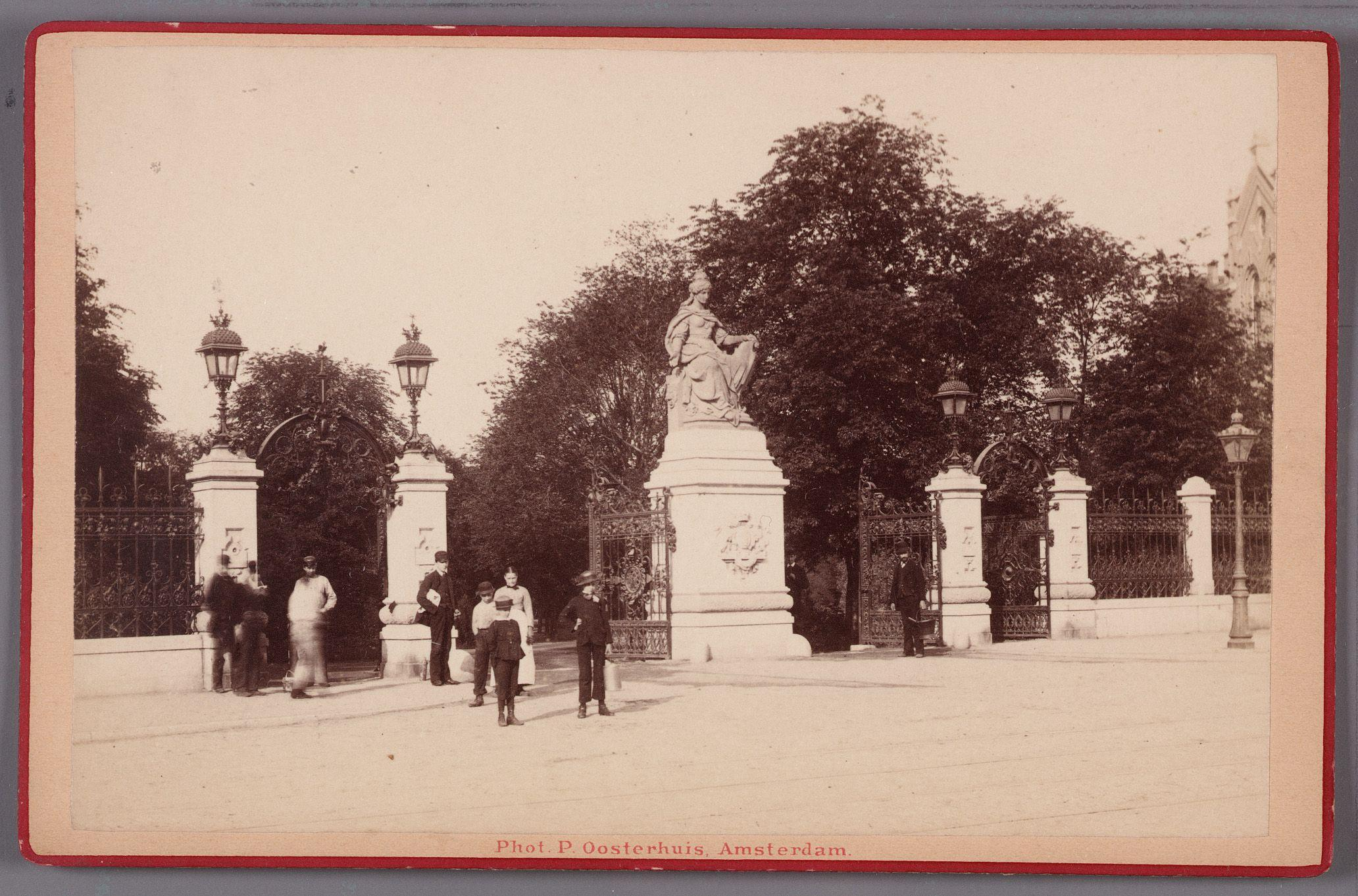 Beschrijving Hoofdingang van het Vondelpark aan de Stadhouderskade. Het monumentale hek werd in 1883 vervaardigd Documenttype foto Vervaardiger Oosterhuis, Pieter Collectie Collectie Stadsarchief Amsterdam: kabinetfoto's Datering 1894 ca. Geografische naam Stadhouderskade Vondelpark Inventarissen Afbeeldingsbestand 010005001211 Generated with Dememorixer